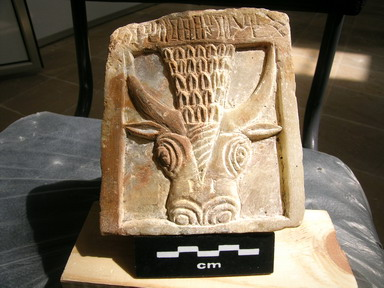 Bainon museum 0